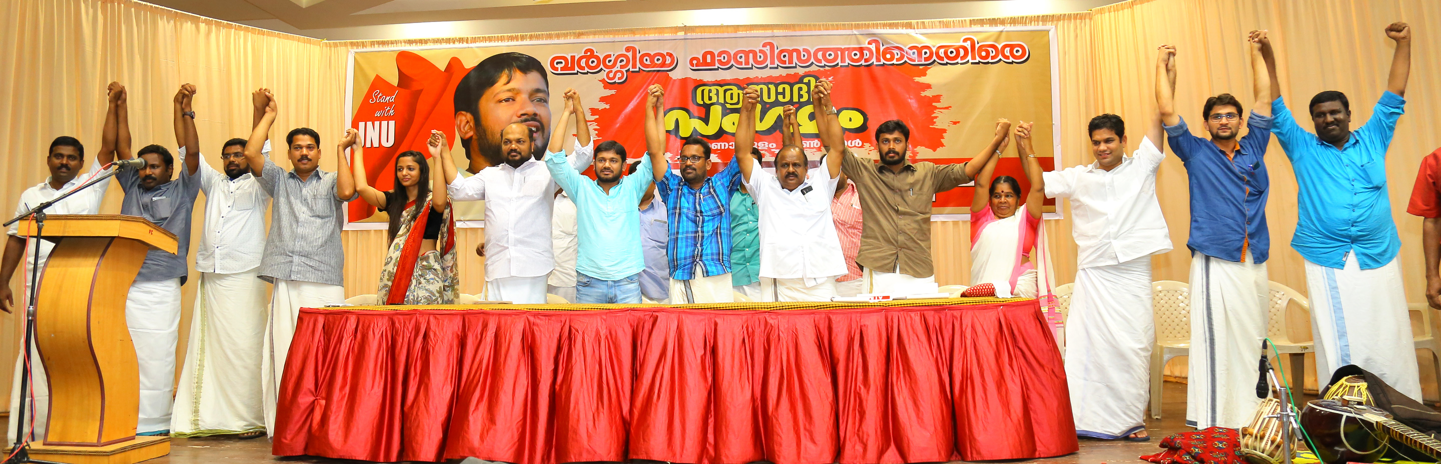 വർഗ്ഗീയ ഫാസിസത്തിനെതിരെ എ ഐ എസ് എഫ് എറണാകുളത്ത് സംഘടിപ്പിച്ച ആസാദി സംഗമം